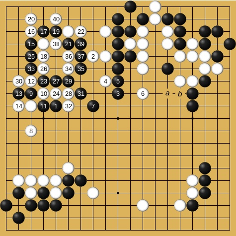 梶原武雄 - (先番)坂田栄男 303手黒6目半勝